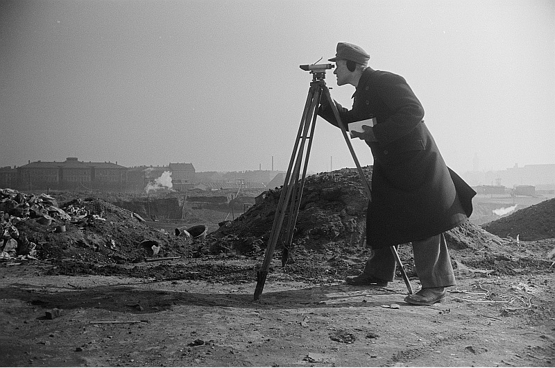 Original image description from the Deutsche Fotothek Porträt eines Geodäten bei der Geländevermessung